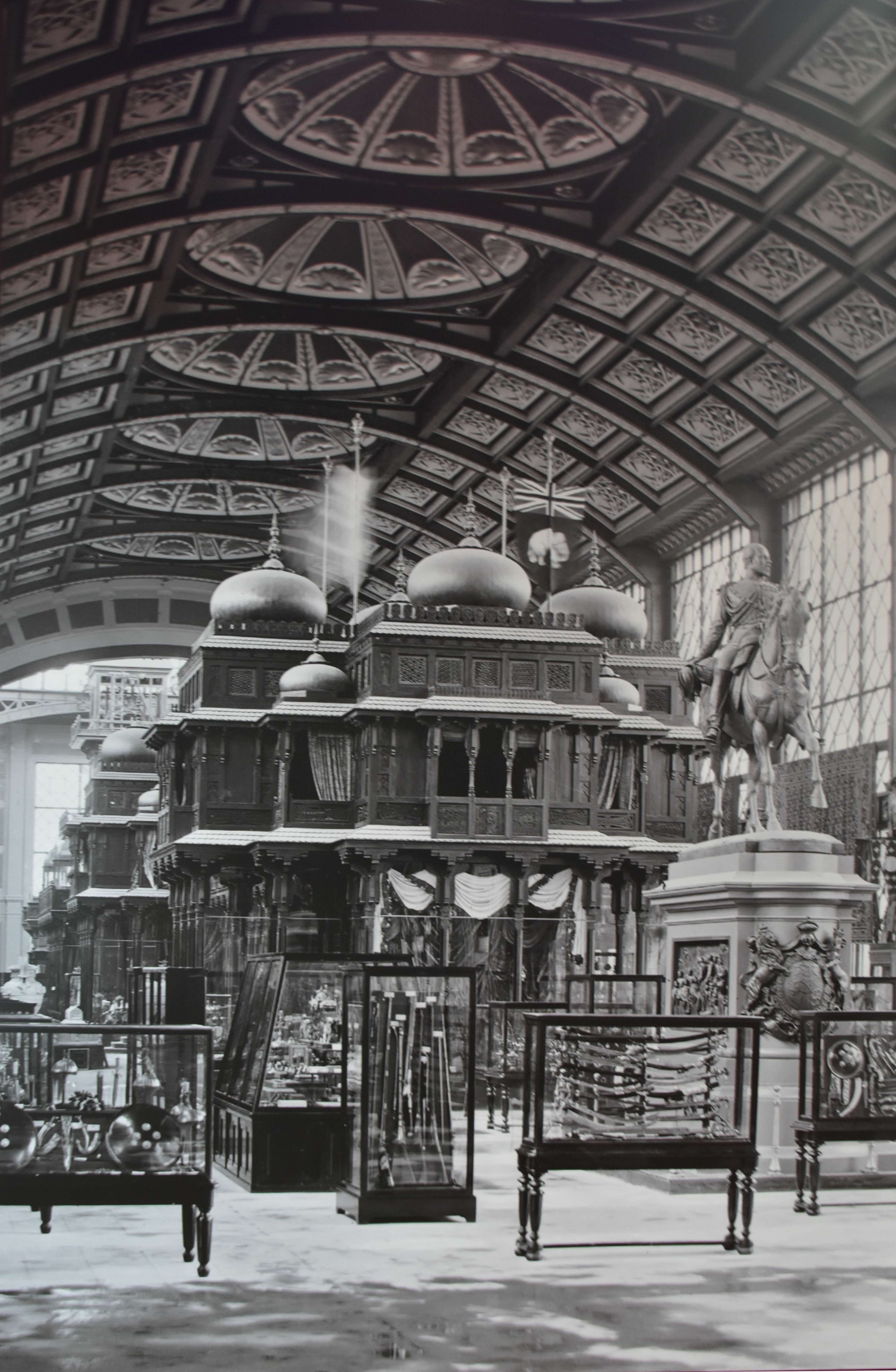 Le Pavillon des Indes pendant l'Exposition universelle de 1878